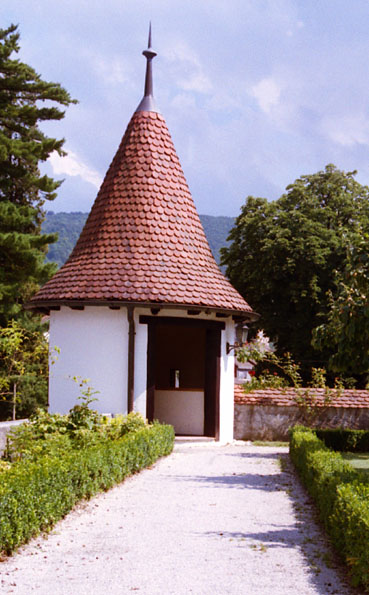 Treppenturm des Schlosses Aesch BL von Westen aus dem Park